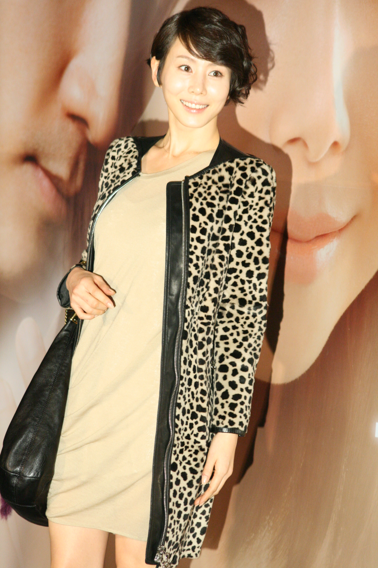 고스트: 보이지 않는 사랑 시사회